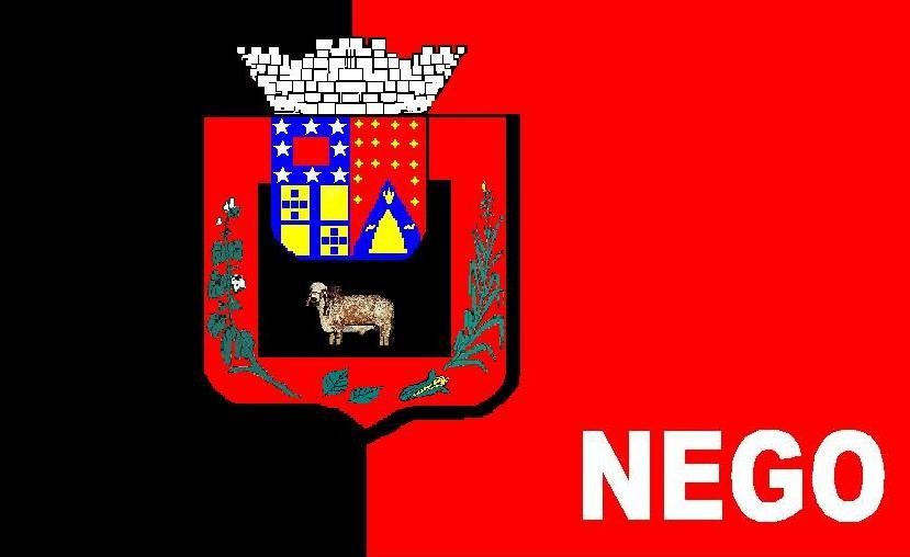 Bandeira de Umbuzeiro, Paraíba.